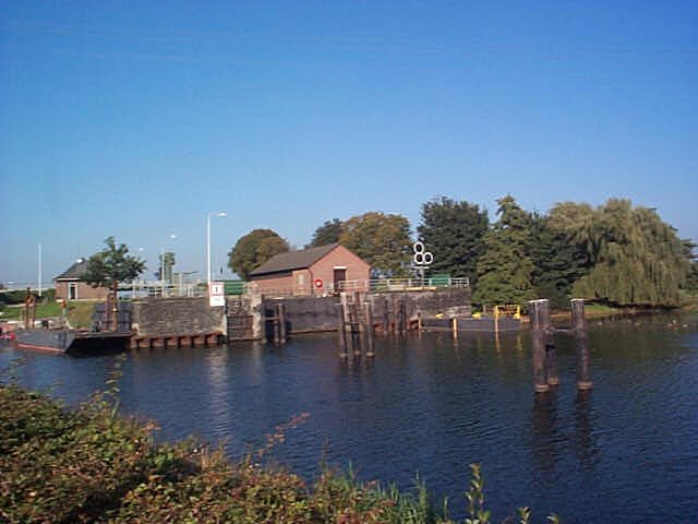 Spoyschleuse in Brienen, gesehen von der Johanna-Sebus-Straße in Wardhausen, Kleve, Niederrhein, NRW, Deutschland